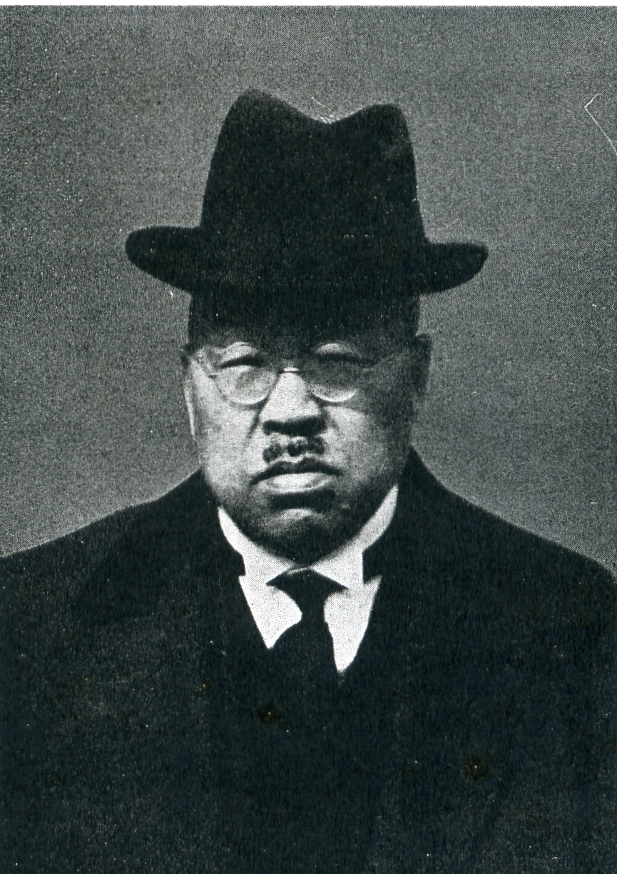 この写真は、佐藤信古（1873-1942）の写真です。